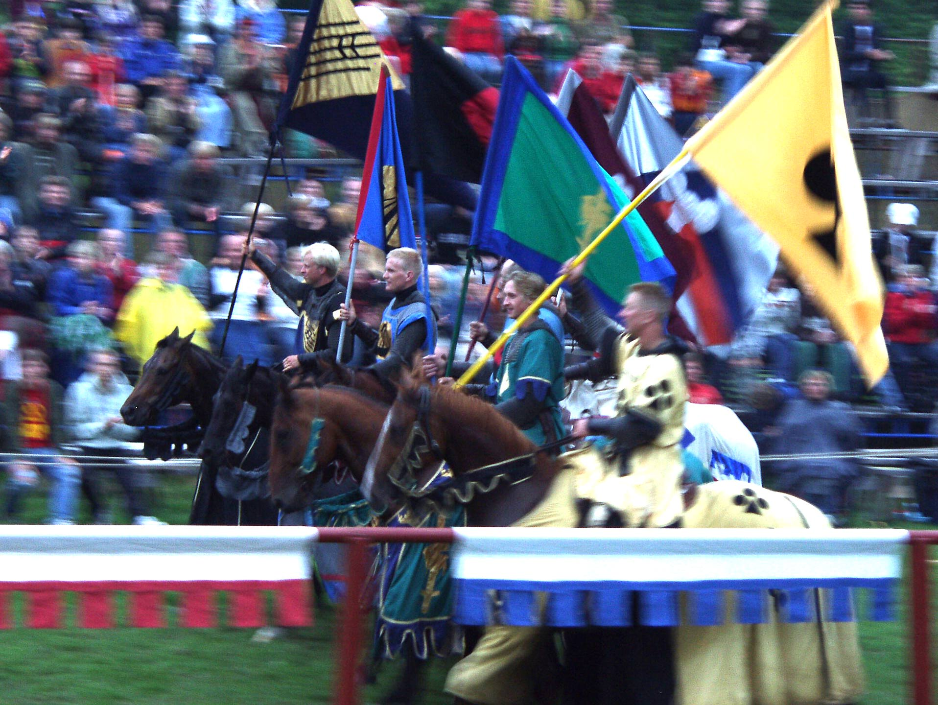 Großes Ritterturnier auf der Medeltidsveckan in Visby, Gotland